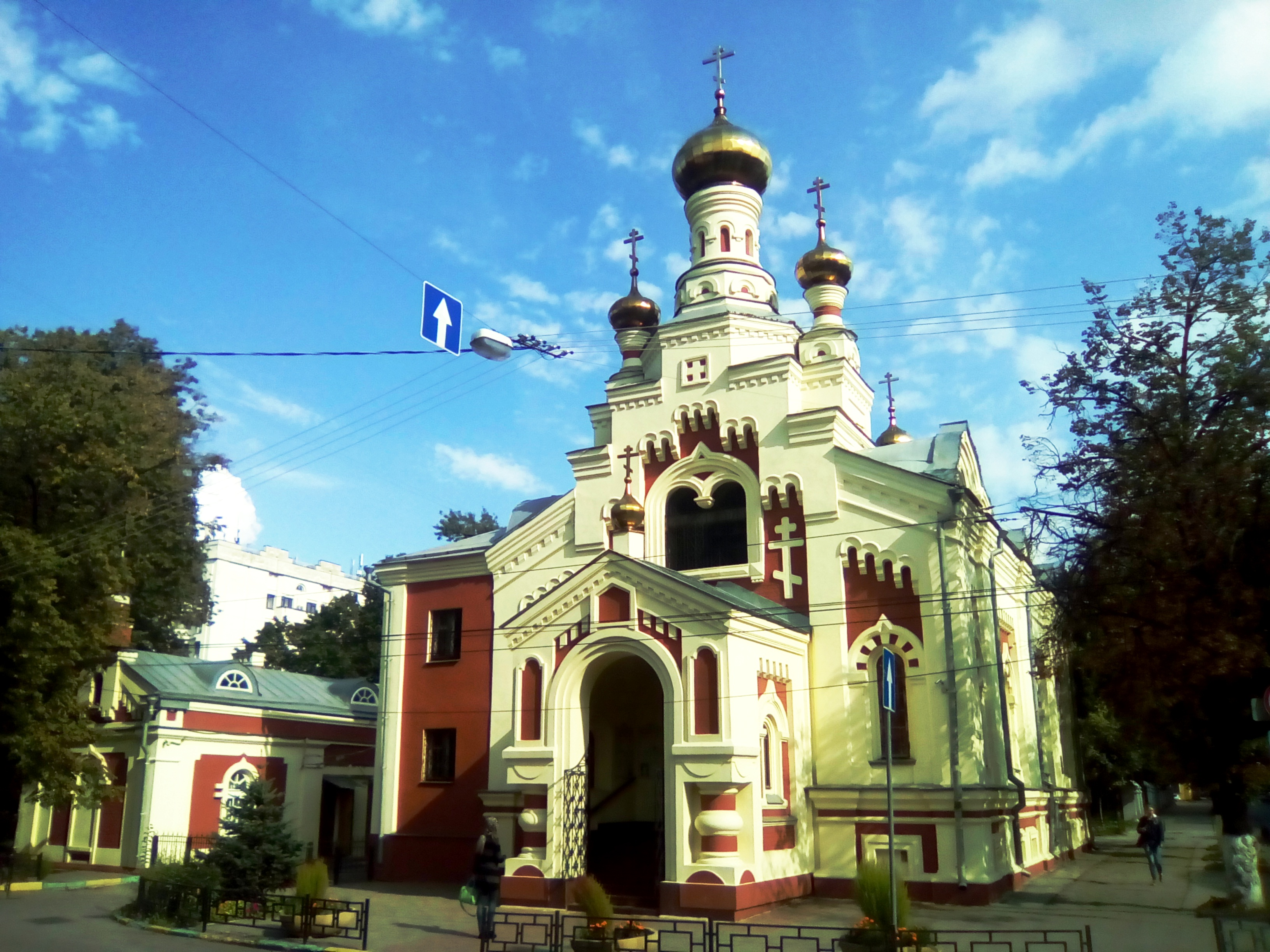 Церковь Всех скорбящих радость иконы Божией Матери: улица Нестерова, 2, Нижний Новгород, Нижегородская область